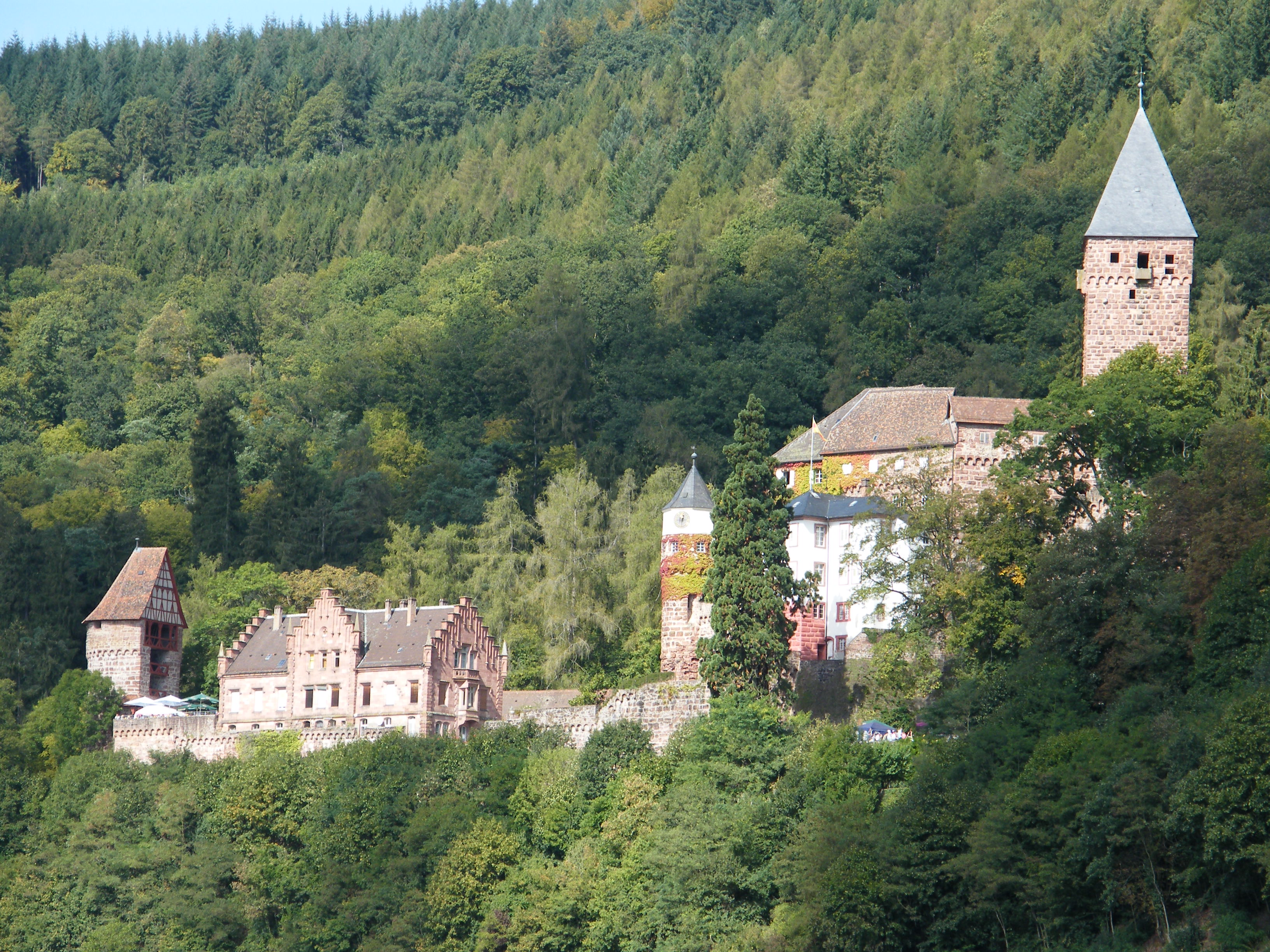 Schloss Zwingenberg